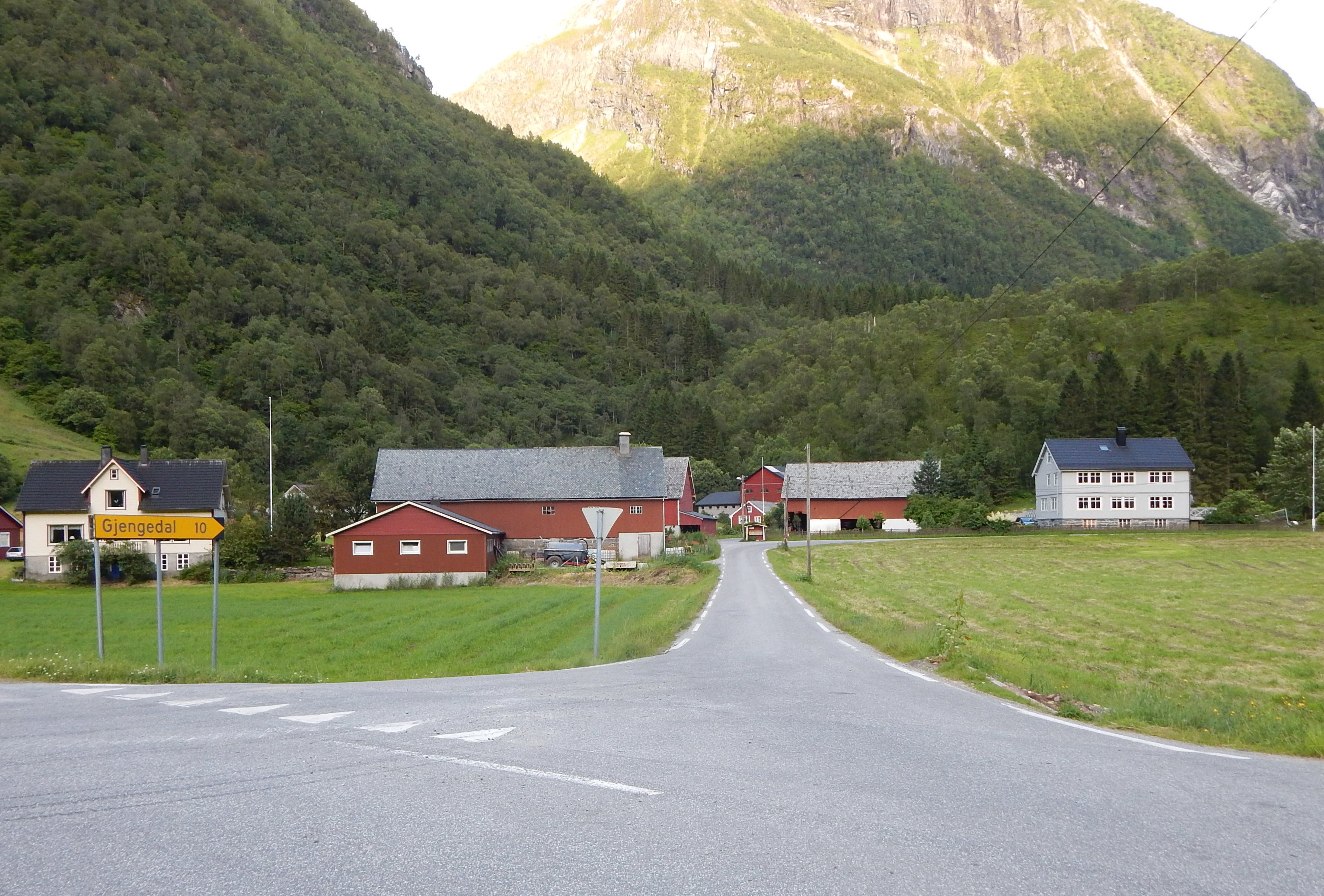 Fylkesvei 5730 (tidl. 691) tar av sørover fra primær fylkesvei 615 og fortsetter opp Ommedalen.